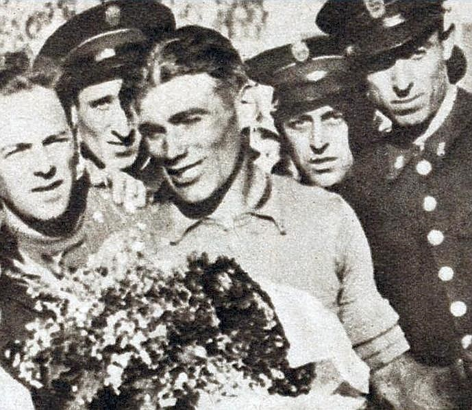 Le Belge Gustaaf Deloor, vainqueur de son second Tour d'Espagne, en juin 1936.